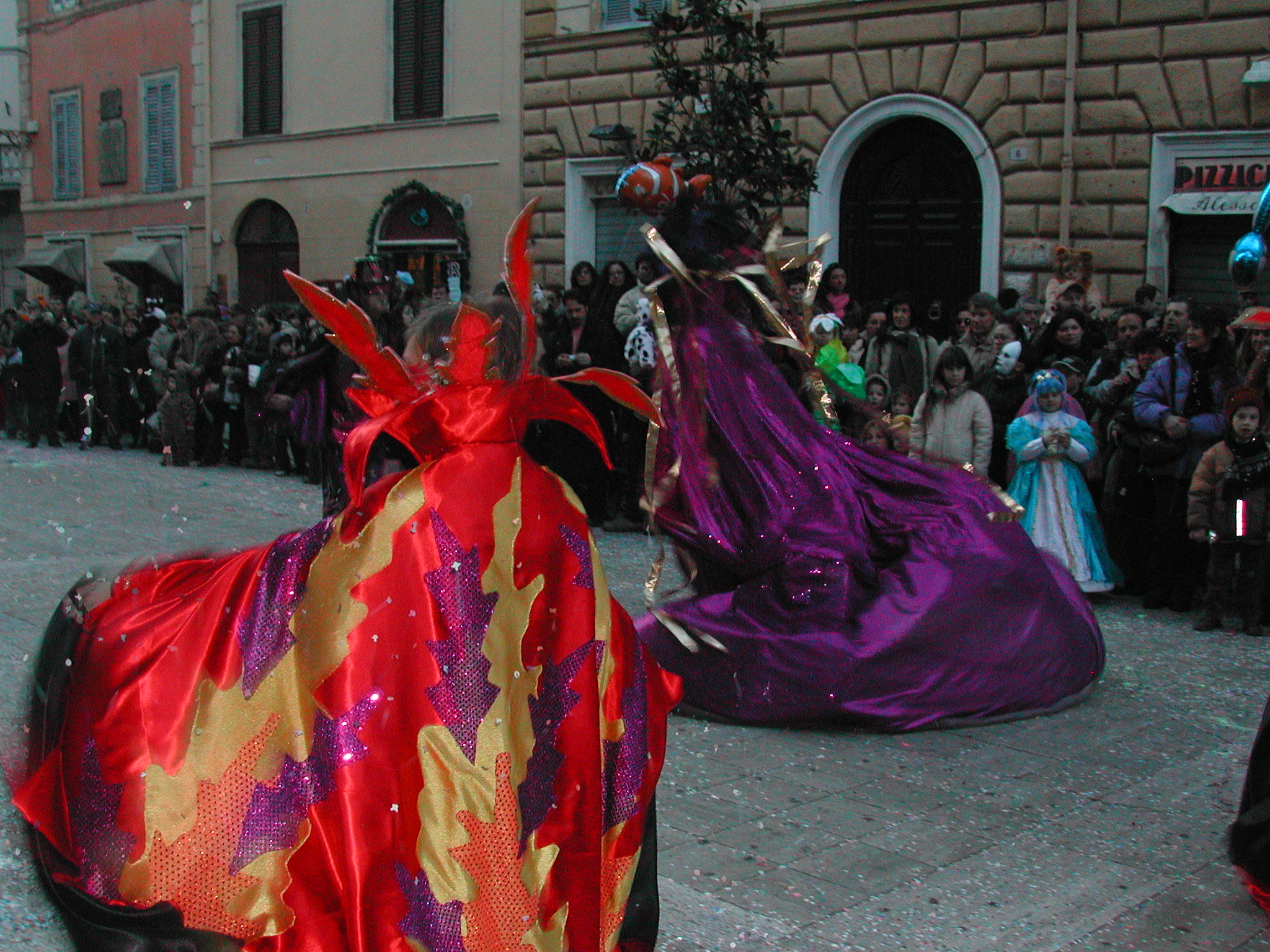 Tivoli (Roma): Carnevale tiburtino 2005: maschere by Lalupa